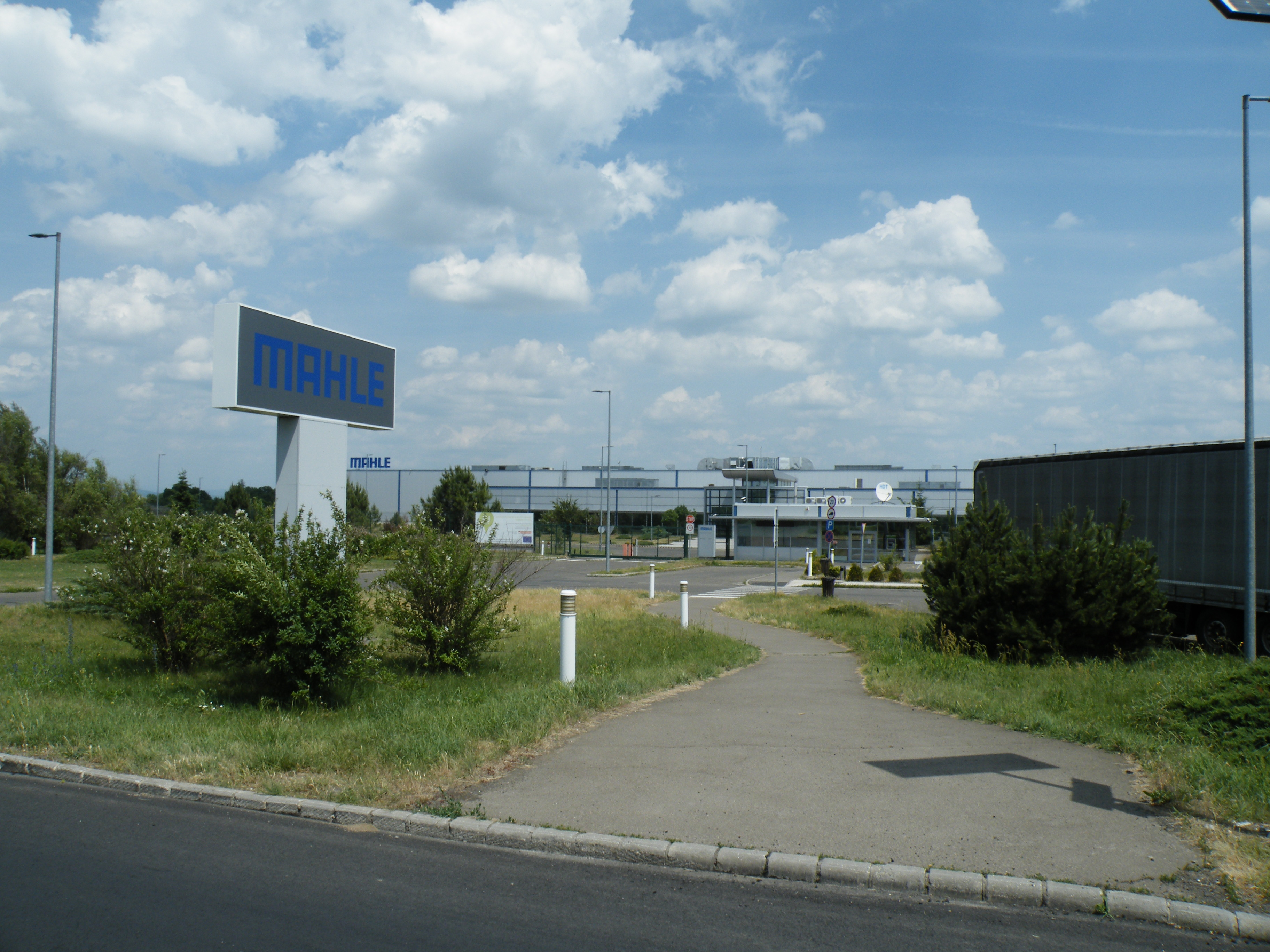 MAHLE Balassagyarmaton